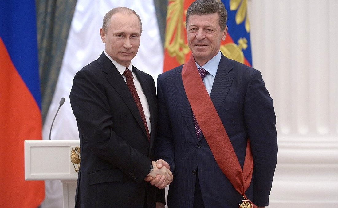 Вручение государственных наград Российской Федерации. Заместитель Председателя Правительства Дмитрий Козак награждён орденом «За заслуги перед Отечеством» I степени.